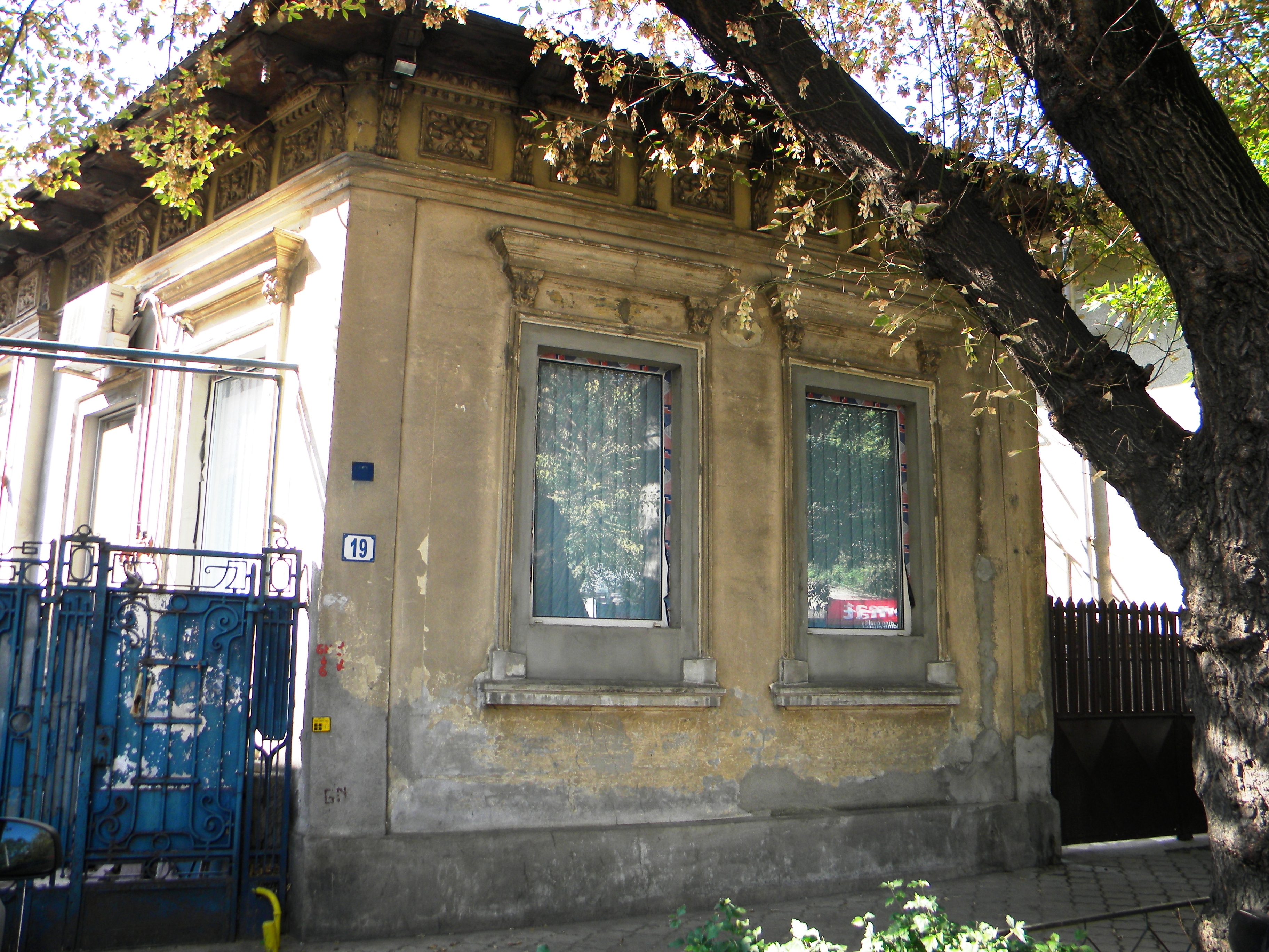 Bucuresti, Romania, Str. Alexandru Ioan Cuza nr. 19; B-II-m-B-18520 (2)